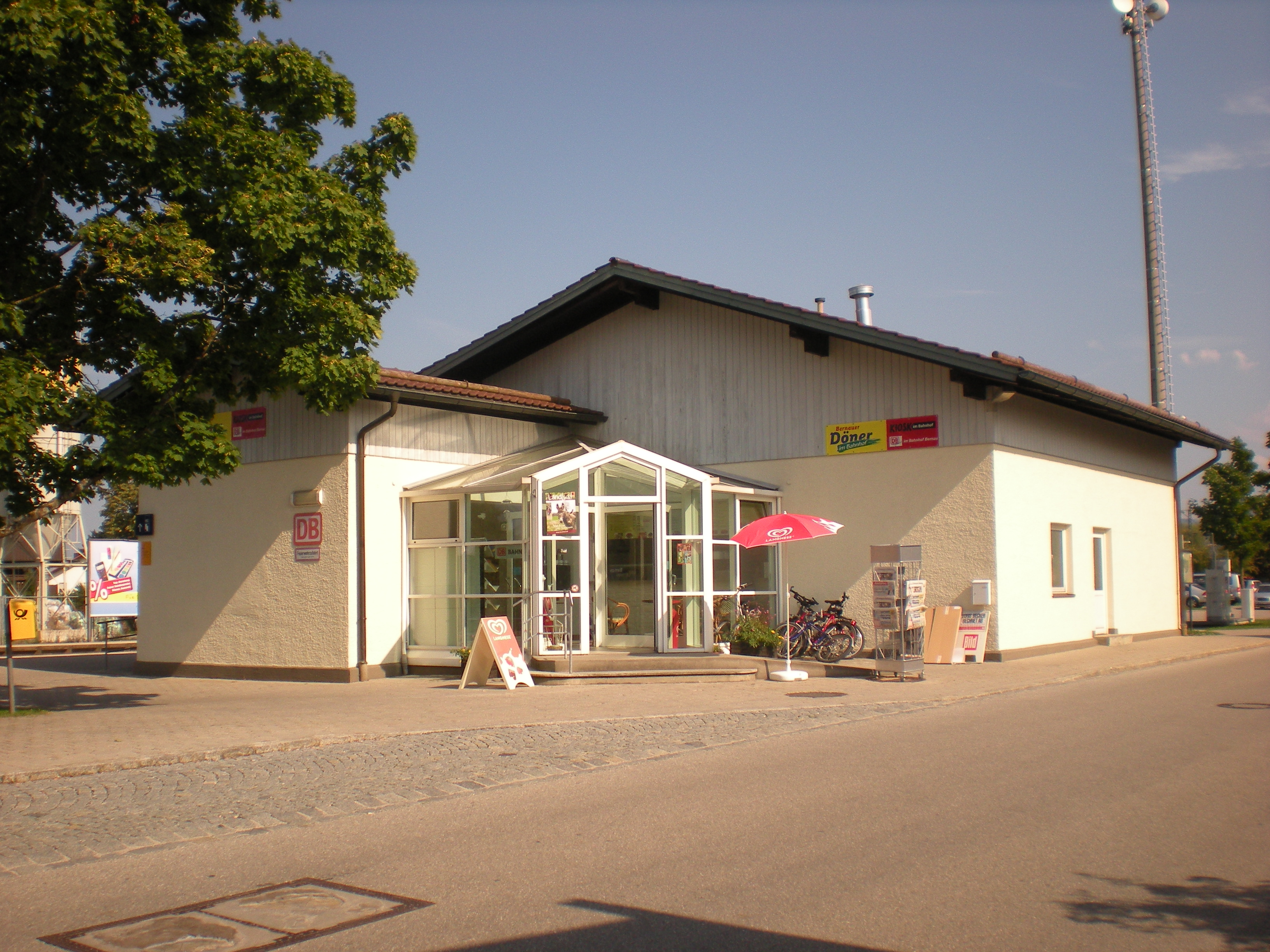 Empfangsgebäude des Haltepunkts Bernau am Chiemsee von der Straßenseite